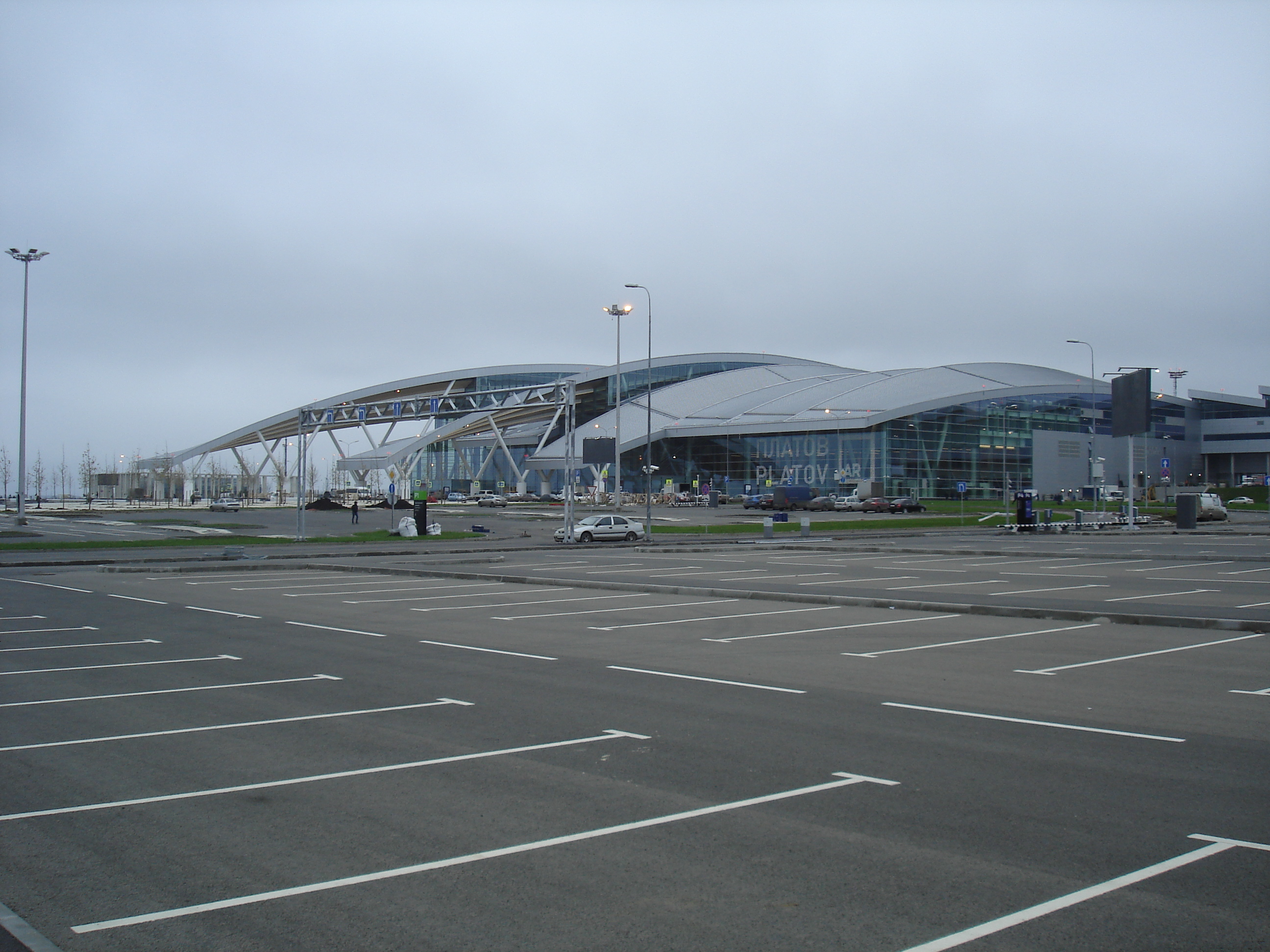 Аэропорт "Платов", ноябрь 2017, пасмурно